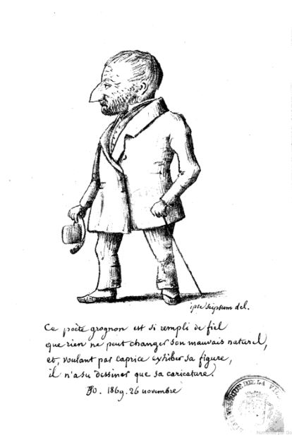 Paul Saint-Olive, dessin et texte par lui-même, 1866 publié dans son livre "Un original" Éditeur A. Vingtrinier, 1866, 24 p. Bibliothèque municipale de Lyo. Google livres